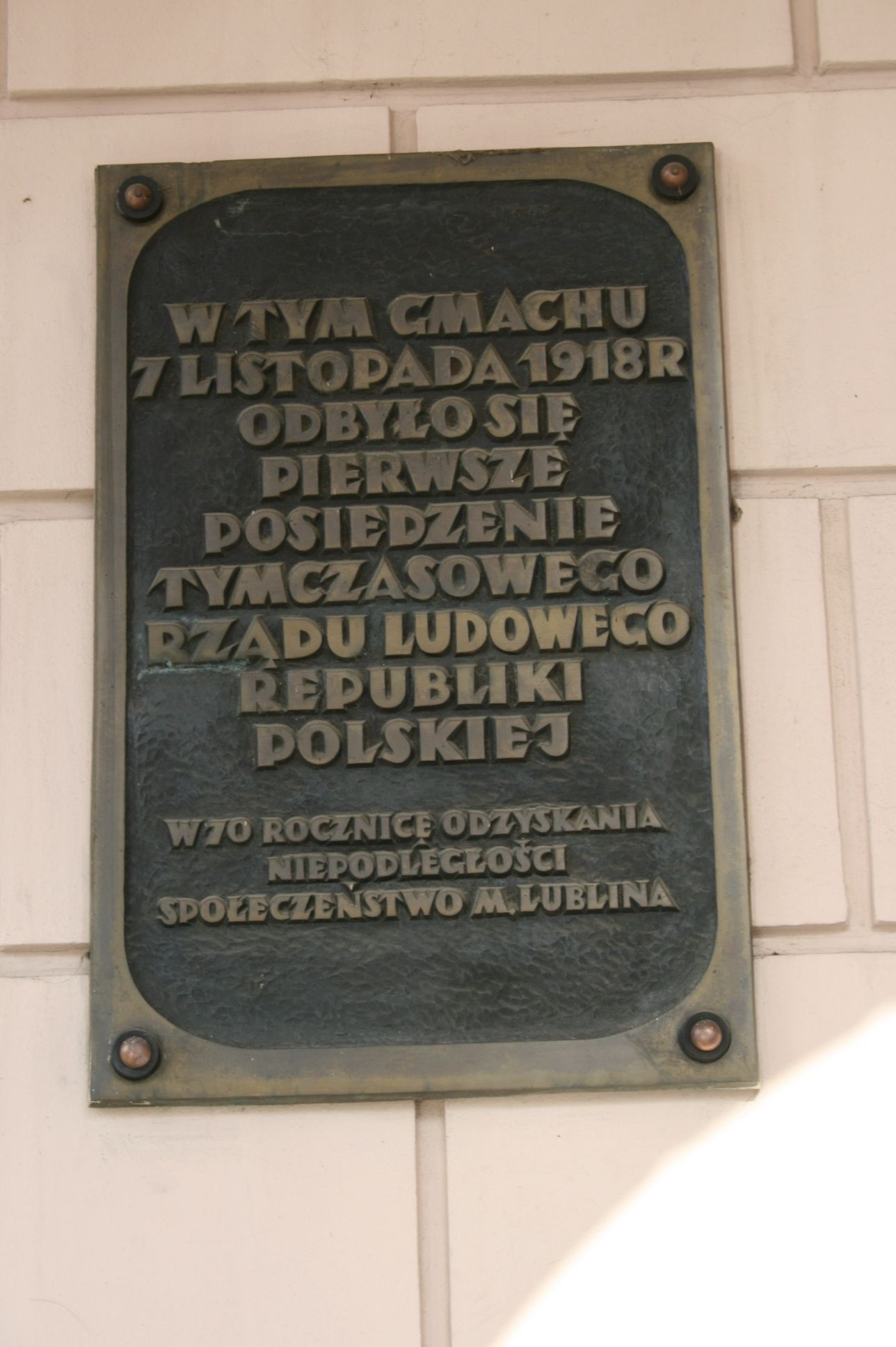 Tablica upamietniająca powstanie Rządu Ludowego RP, pałac Lubomirskich (Poradziwiłłowski) w Lublinie.